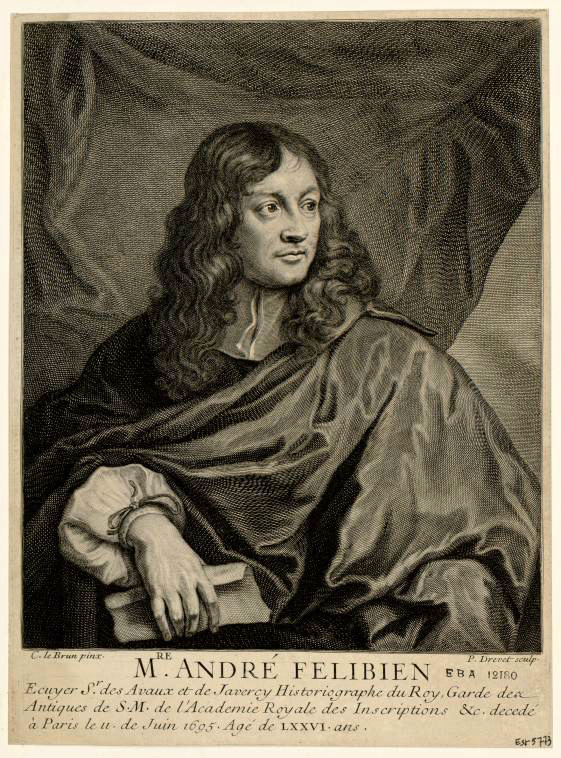 Ritratto di André Félibien. Signore del Avaux Ecuyer e Javercy. Storico del Re, Custode di S. Antiquariato M. della Reale Accademia delle Iscrizioni. All'età di 76 anni.